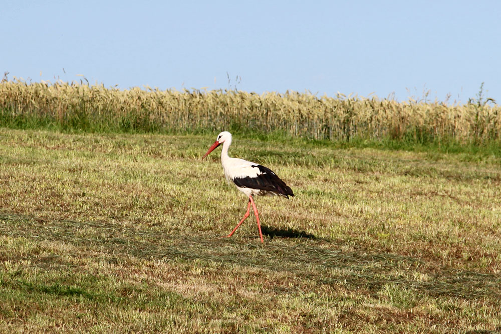 Weißstorch auf dem Feld am Hüttertal